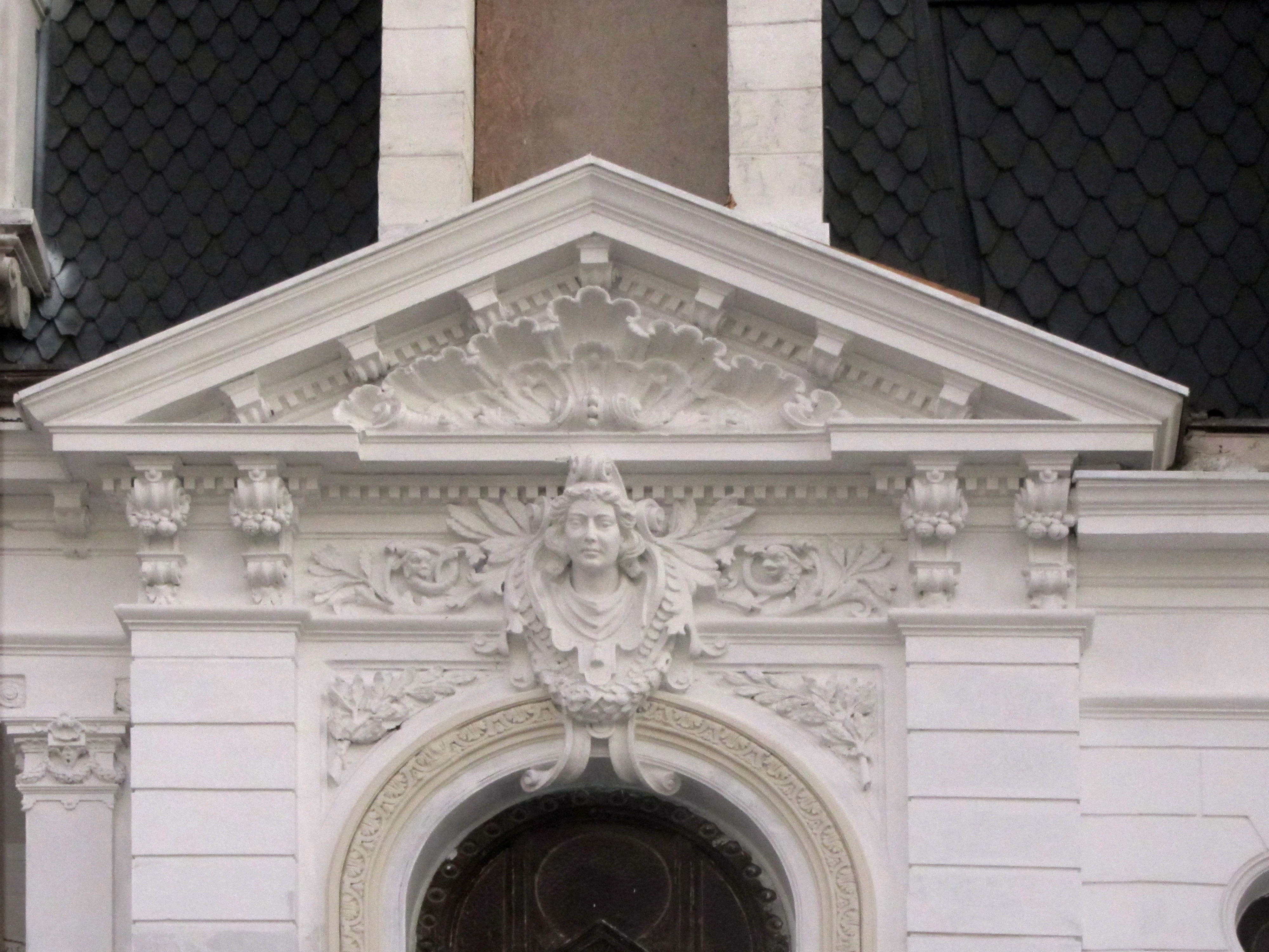 Detalle del Palacio Polanco en 2017 Valparaíso, Chile